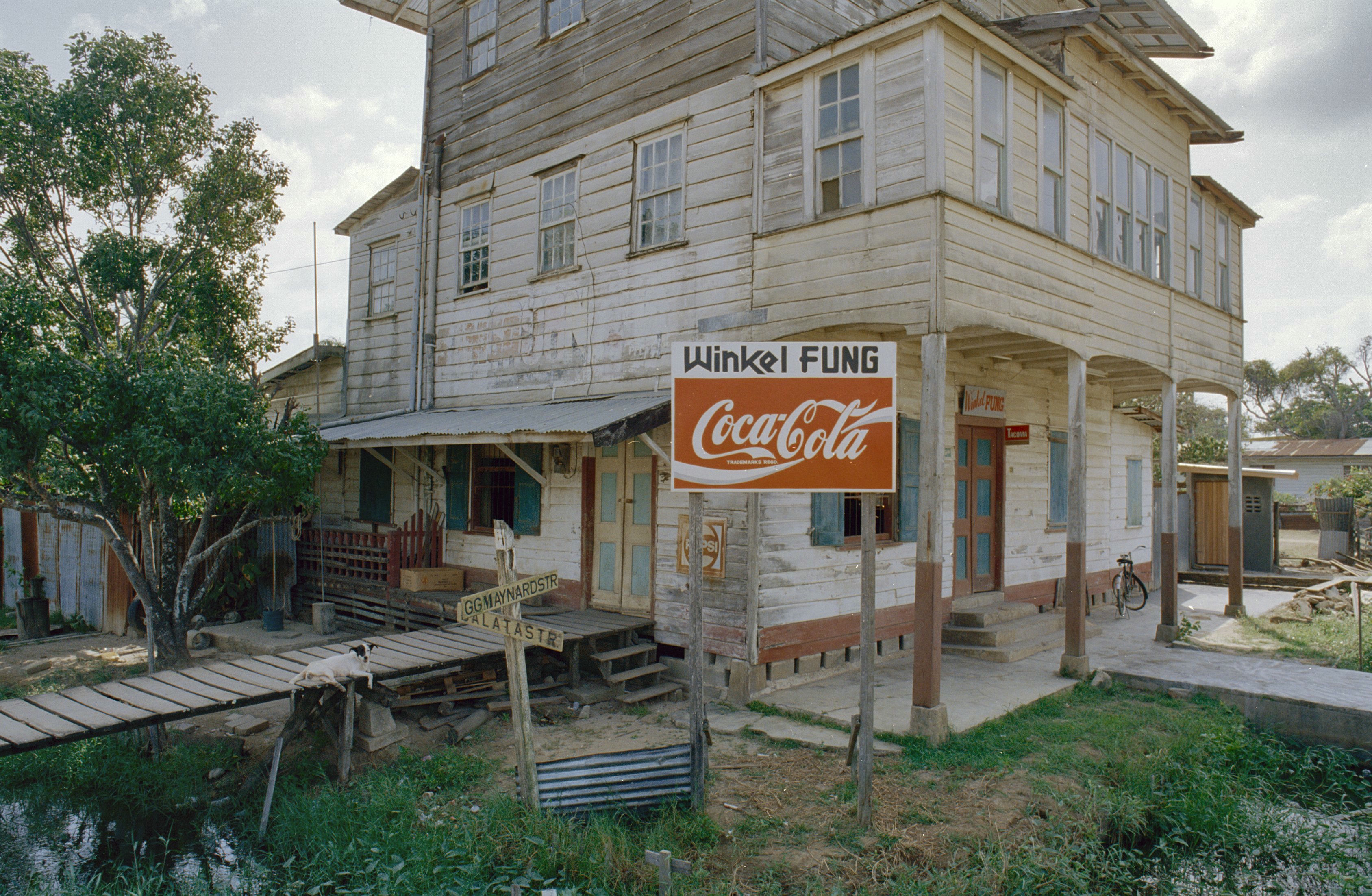 Welgelegen: Overzicht op voorgevel - chinees winkelpand Fung (opmerking: Suriname Reis Loek Tangel)